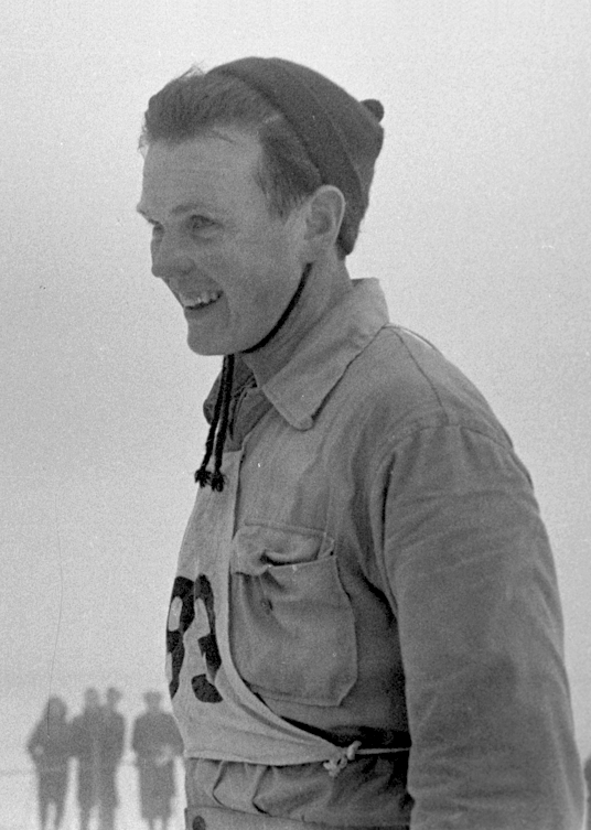 Magnar Estenstad. Han ble Norgesmester på fem-mila, 50 km. NM. Norgesmesterskap på ski, langrenn på Høsbjør i Furnes 1949. Skisport. Vinteridrett. Langrennsløper.